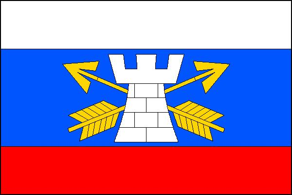 Vlajka obce Dražovice (okres Klatovy)